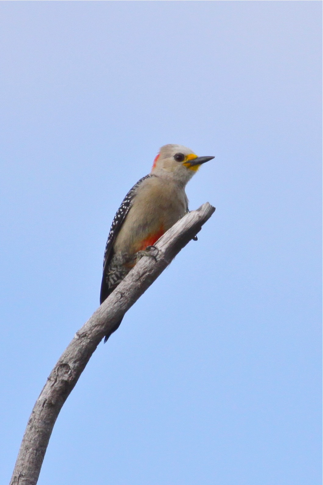 Costa Maya, Mexico